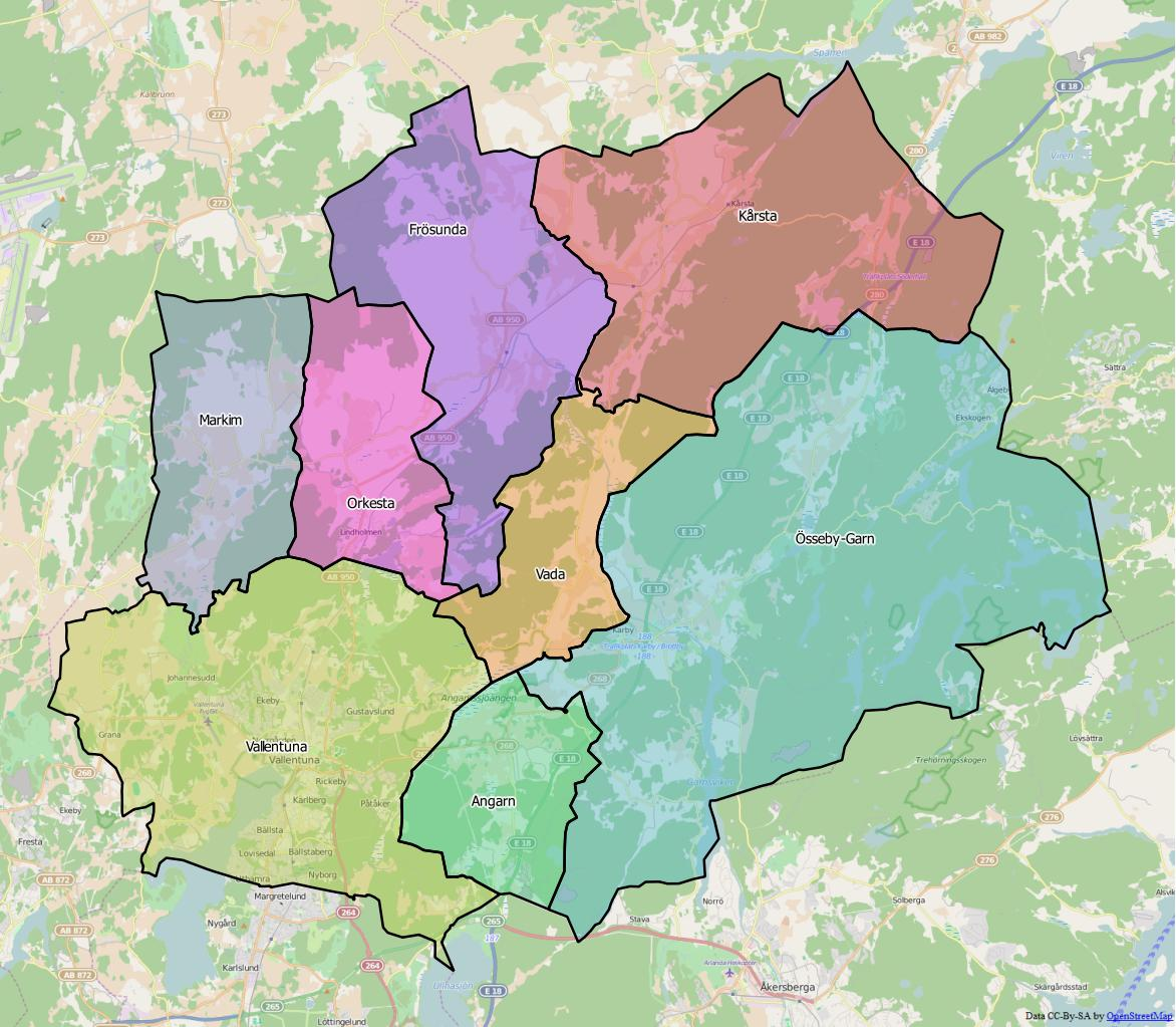 Distriktsindelningen i Vallentuna kommun World file: 49.33335686883619076 0 0 -49.33335686883619076 1997822.30367024638690054 8333827.04194395057857037